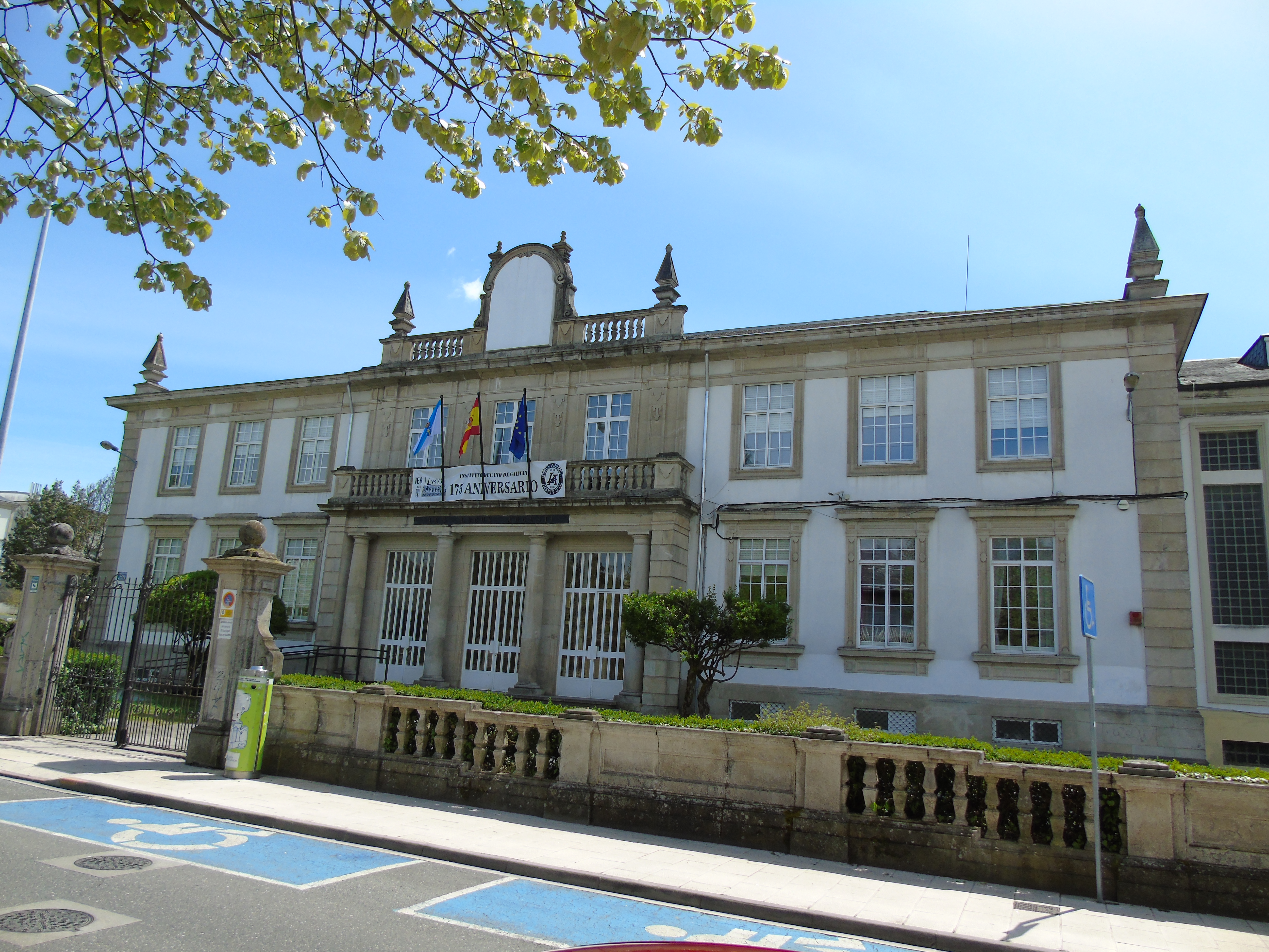 Instituto de Enseñanza Secundaria Lucus Augusti, en Lugo (España).